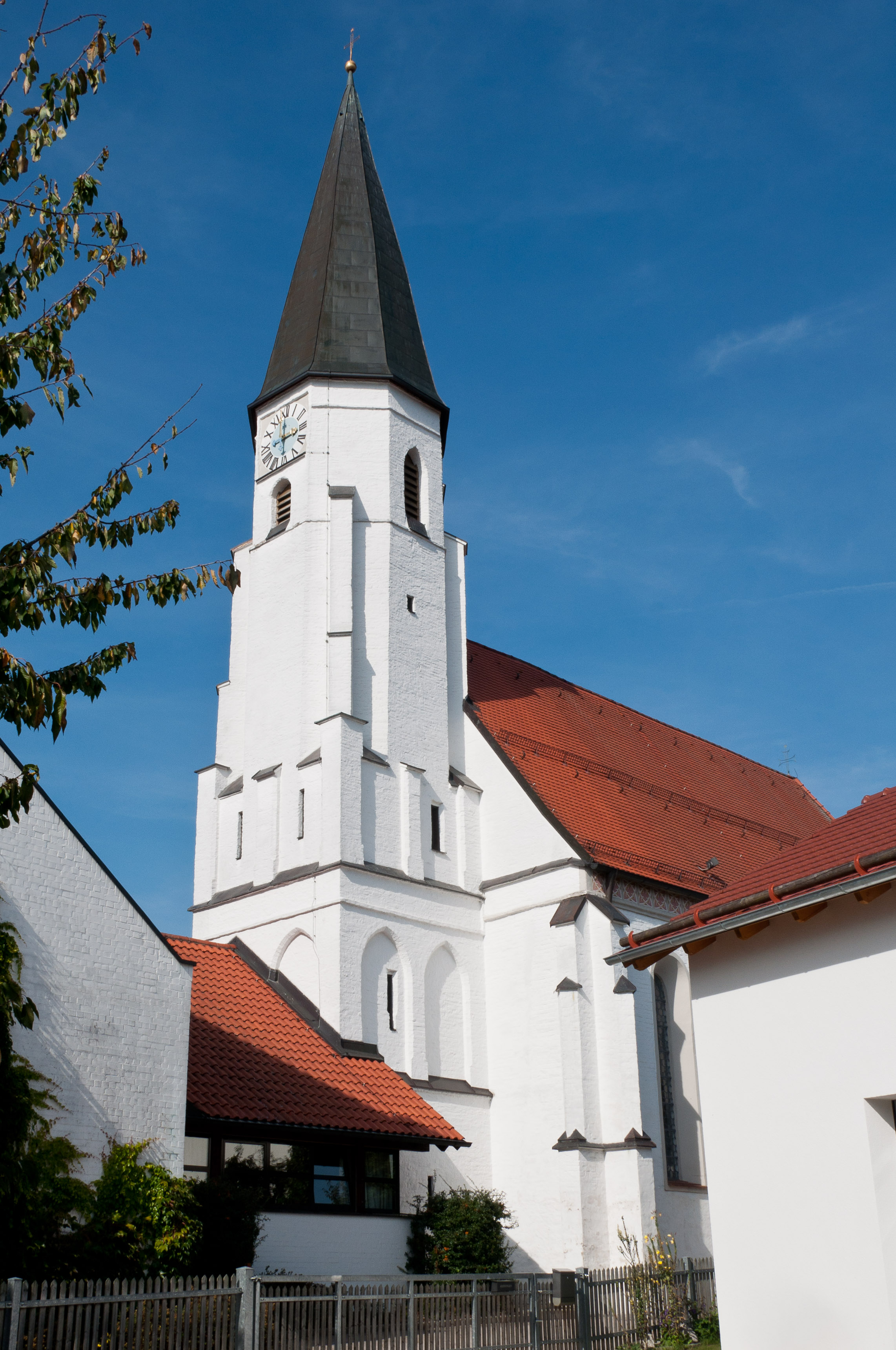 Altdorf-Niederbayern, Kirchgasse 4, Gebäudeaussenansicht, Denkmal Kirche St. Nikolaus - spätgotisch